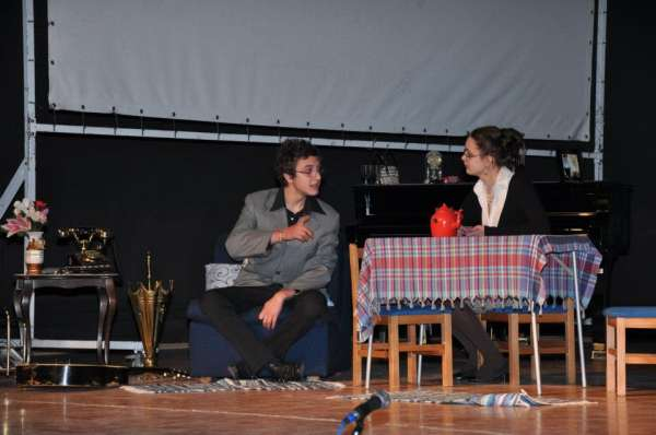 Театарска претстава “Бумеранг“